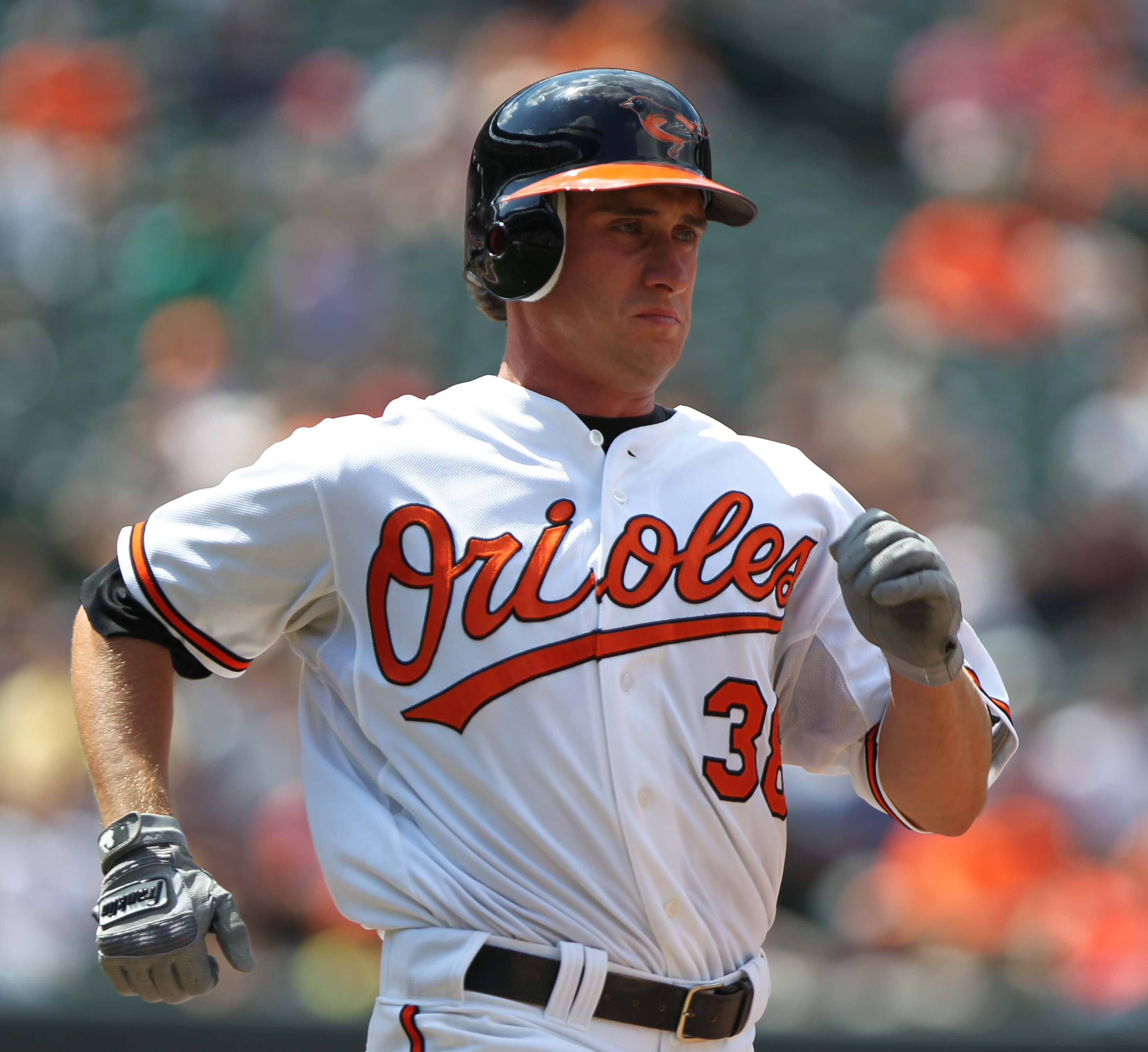 Matt Angle